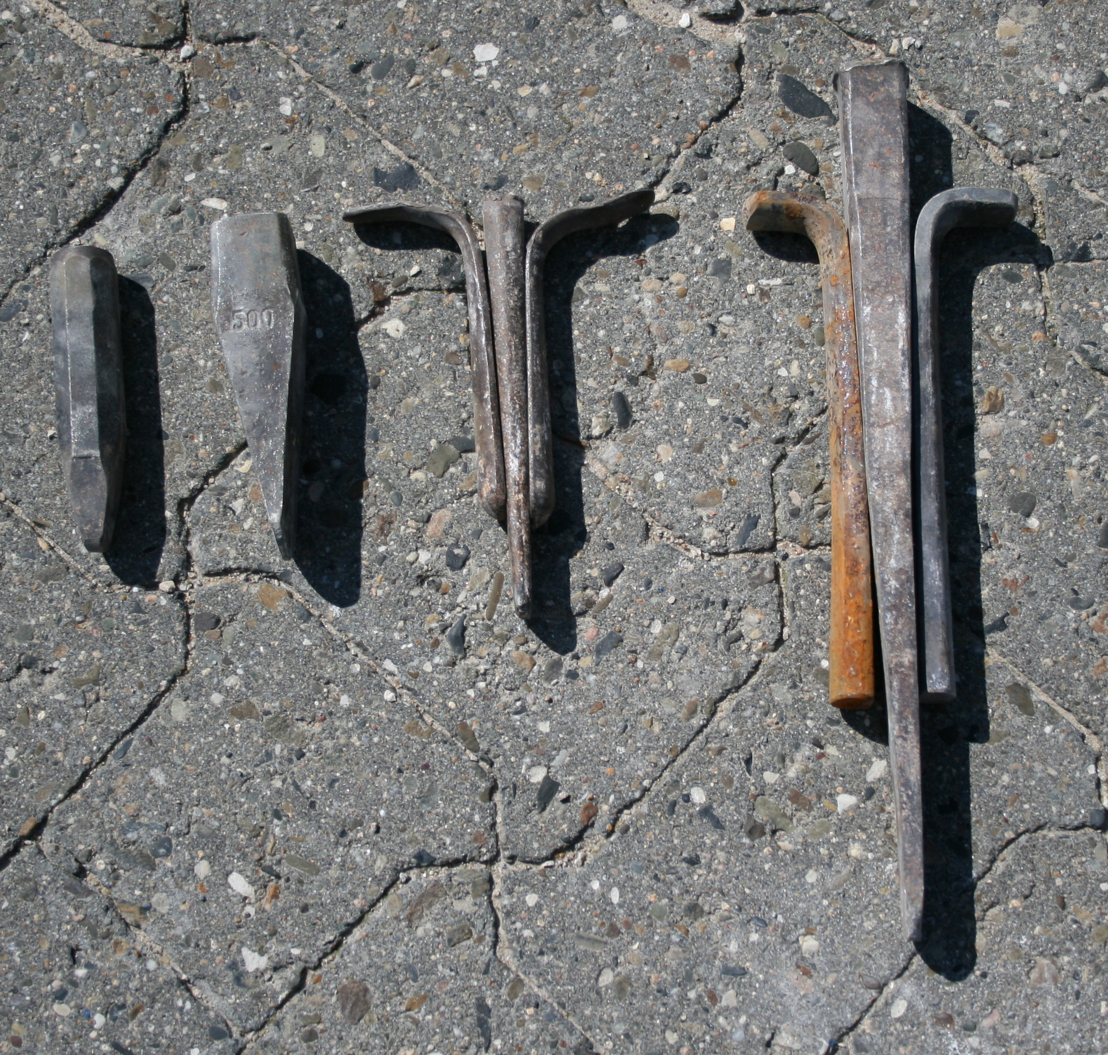 Keile